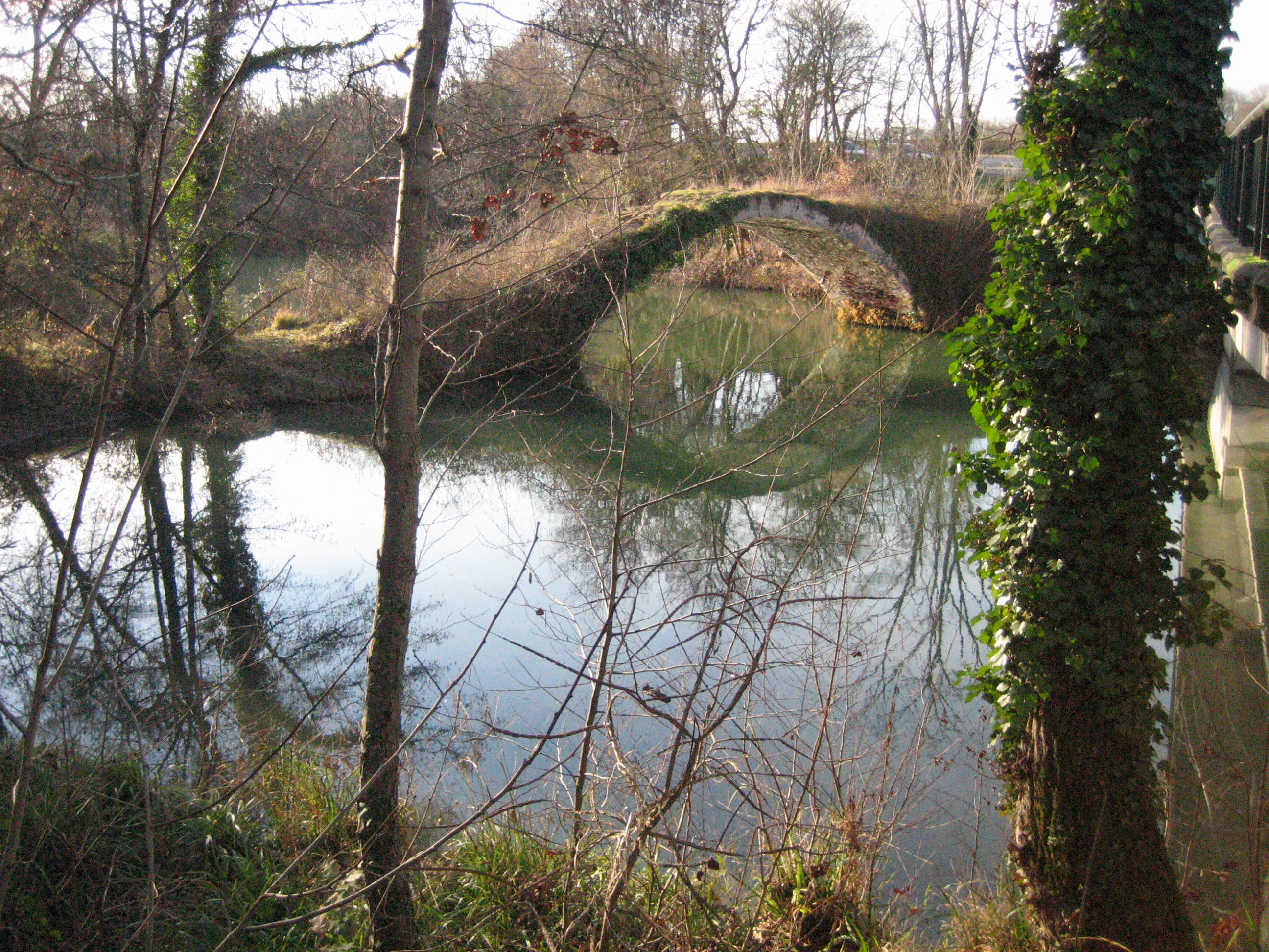 Le Volp au pont du Diable à Saint-Christaud (Haute-Garonne). Vue vers l'amont.